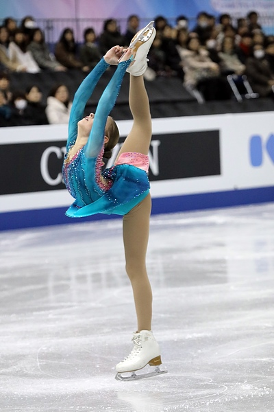 Алёна Косторная (Россия) на финале юниорского Гран-при 2017-2018